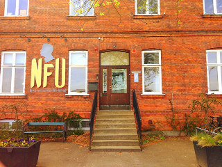 Gymnasieskolan Nils Fredriksson Utbildning